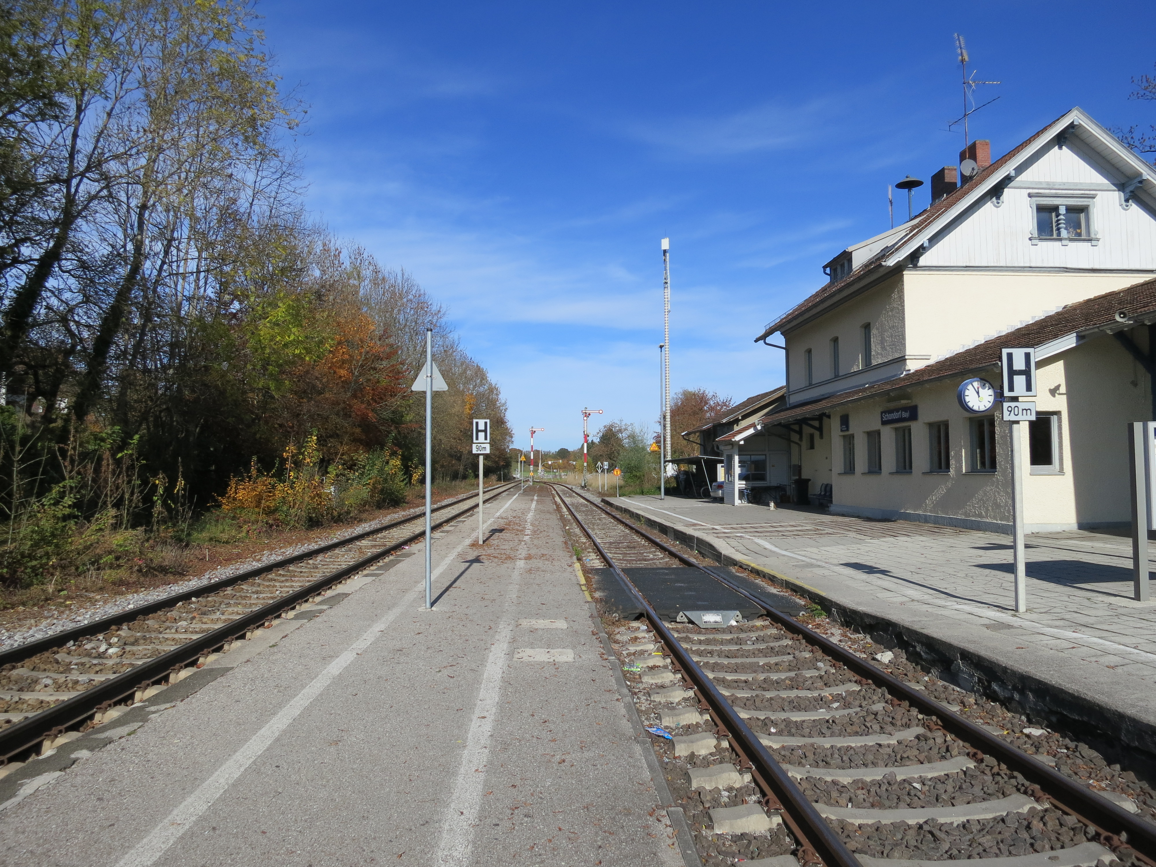 Bahnsteige des Bahnhofs Schondorf und Empfangsgebäude von der Gleisseite